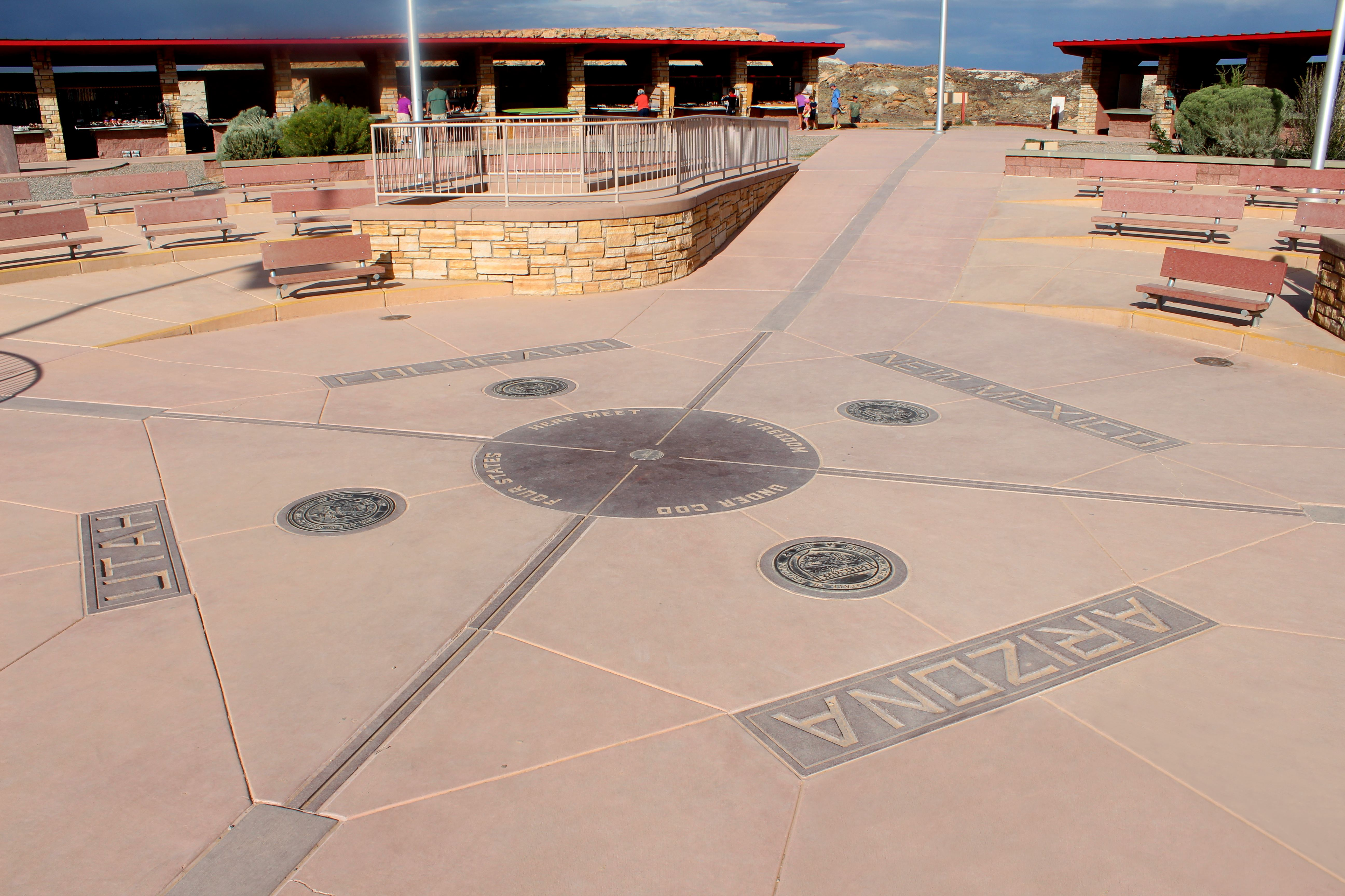 Four Corners Monument